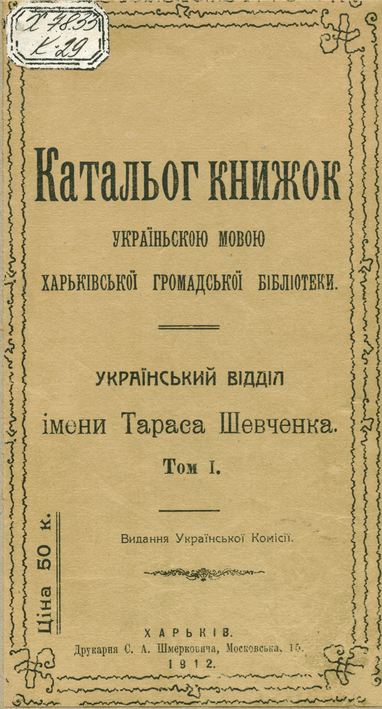 Каталог книжок українською мовою Харківської громадської бібліотеки. Т. 1 / Укр. від. ім. Т. Шевченка ; [уклад. П. Мокроус] ; вид. укр. коміс. Харків, 1912. [6], 98 с. Обкладинка видання.